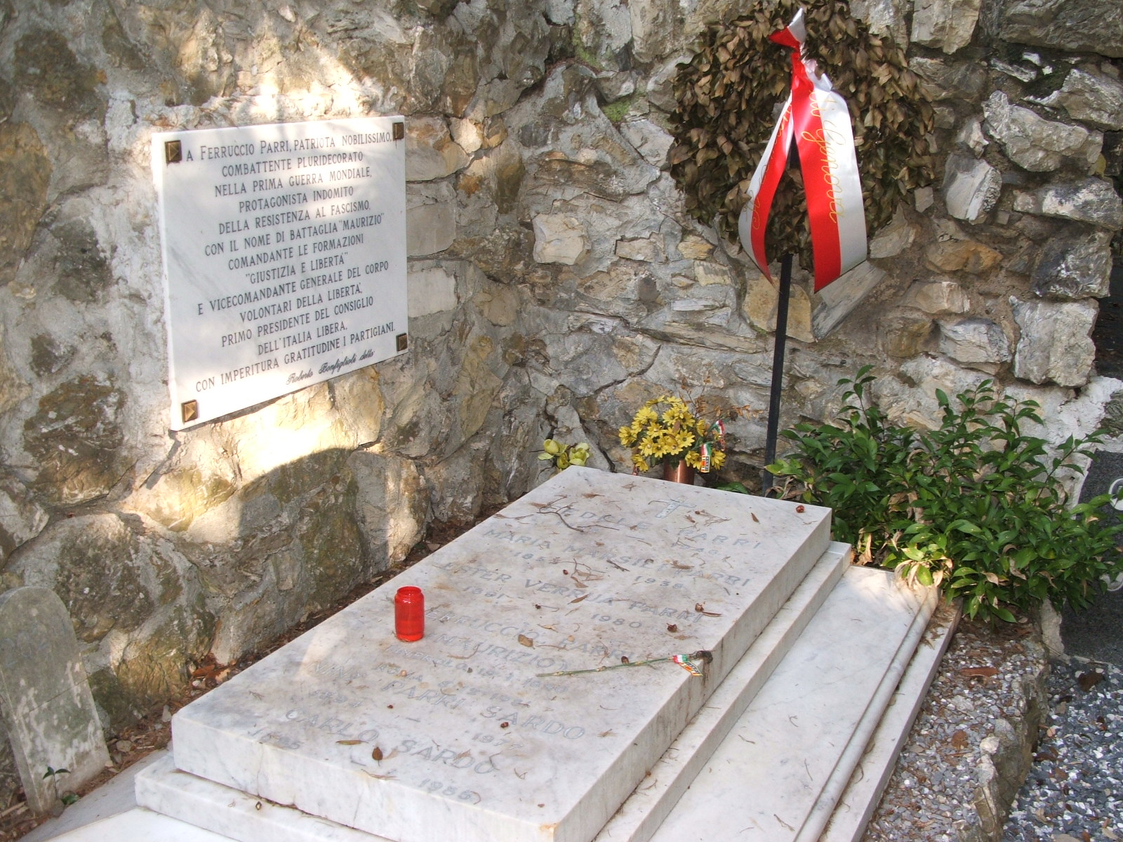 Tomba di Ferruccio Parri al Cimitero monumentale di Staglieno, Genova